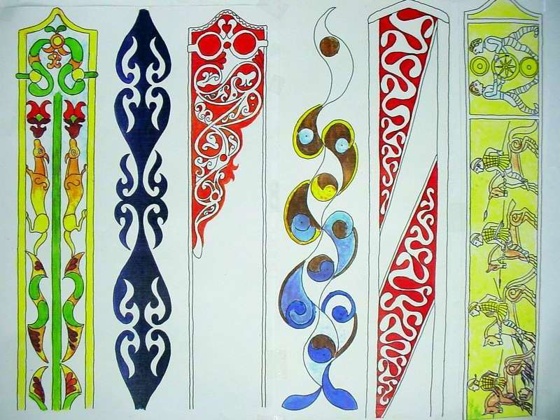 Fríz mintázatok kelta kardokon: részlet Bérczi Szaniszlónak a kelta művészetet bemutató kiállítási és kifestő füzetéből